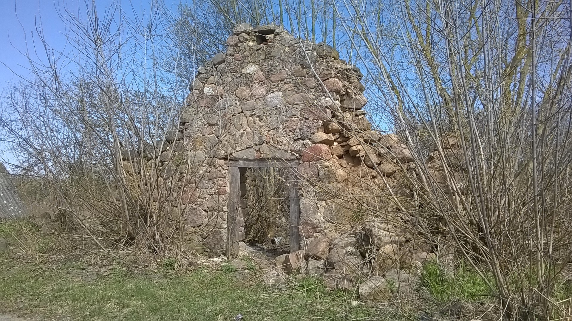 Руіны гаспадарчай пабудовы пачатку 20 стагоддзя ў вёсцы Новікі Квасоўскага сельсавета Гродзенскай вобласці.